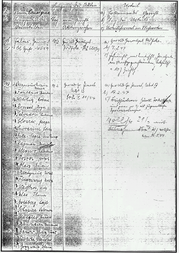 Archives du jugement des 22 francs-tireurs et partisans exécutés au fort du Mont-Valérien le 21 février 1944 et d'Olga Bancic, exécutée à Stuttgart le 10 mai 1944. Voir l'Affiche rouge. Document rédigé en écriture cursive Sütterlin.